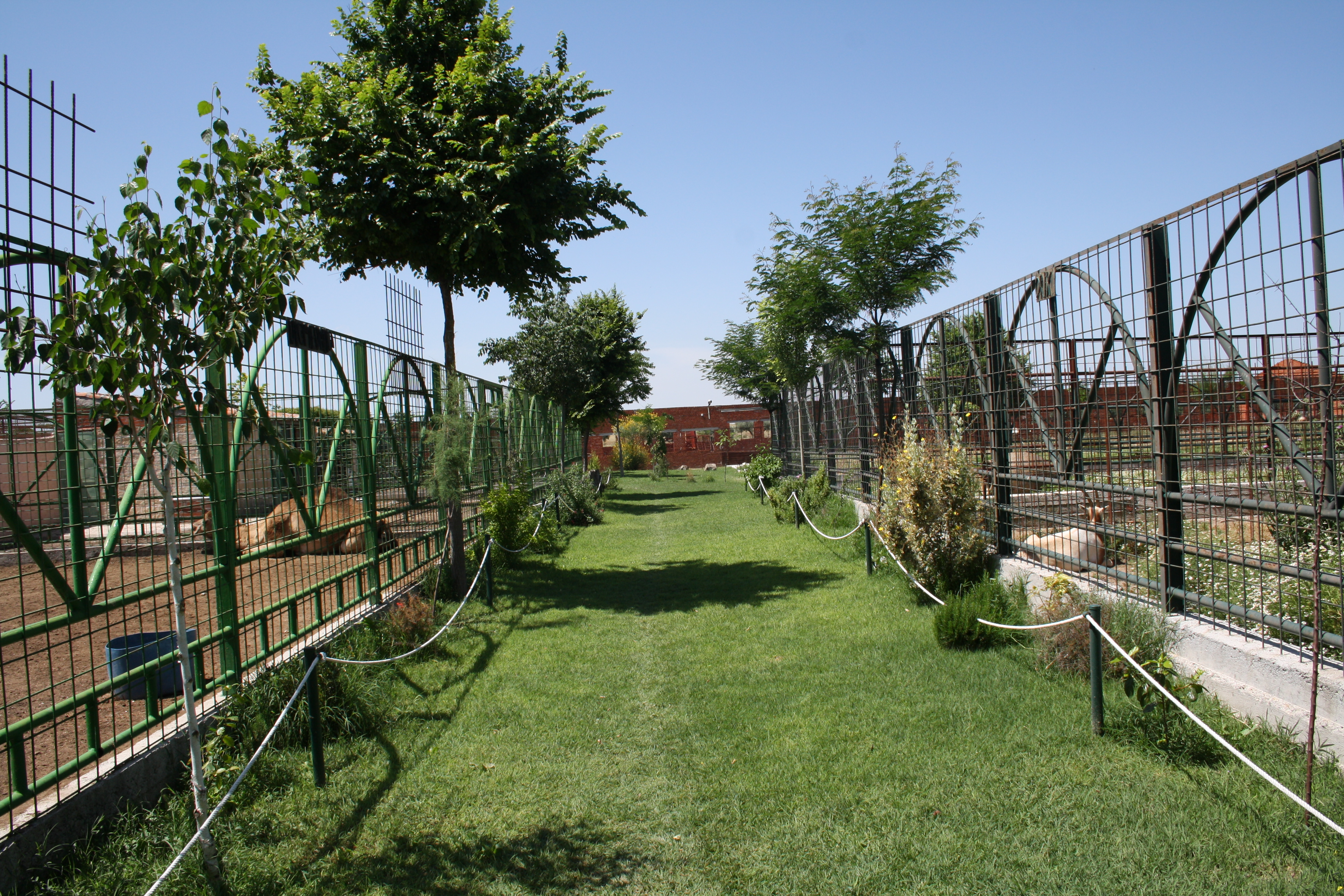 Paseos de Zoo KOKI (Parque zoológico y botánico)